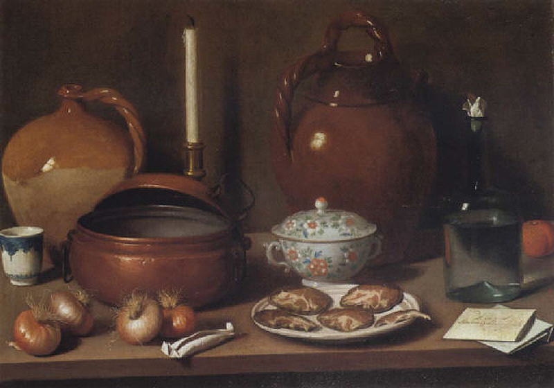 Natura morta con cipolle, lonza e lettere